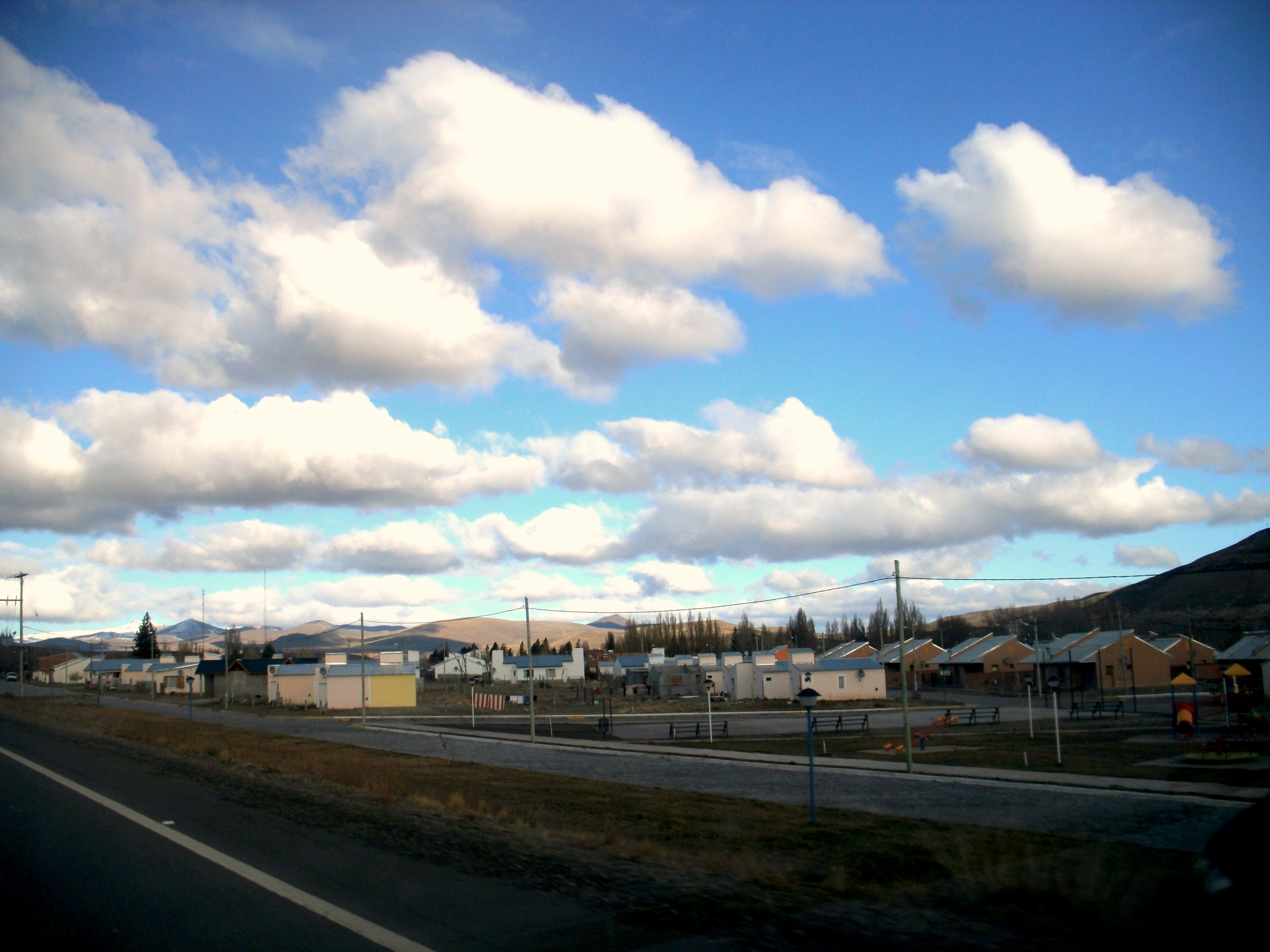 Geografìa de la localidad